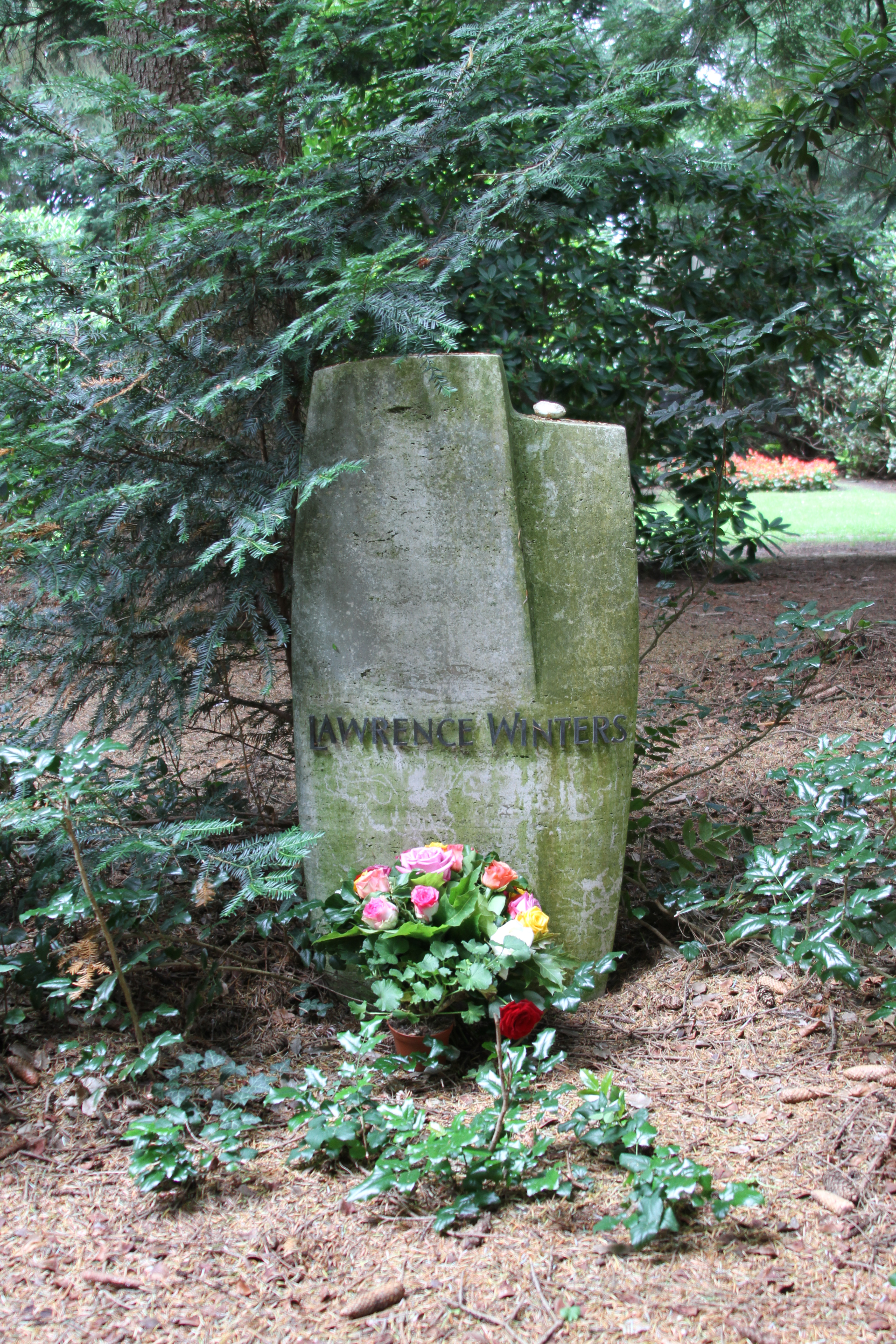 Lawrence Winters (eigentlich Lawrence Whisonant; * 12. November 1915 in Kings Creek, South Carolina; † 24. September 1965 in Hamburg) war ein US-amerikanischer Opernsänger (Bariton).